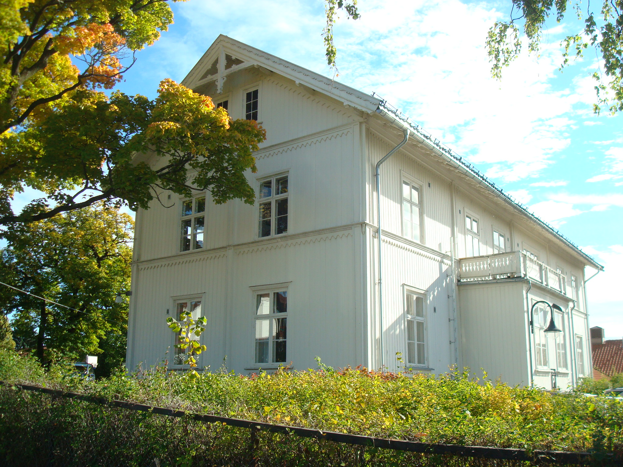 Søndre Hasle gård, Frydenbergveien 37 i Oslo.